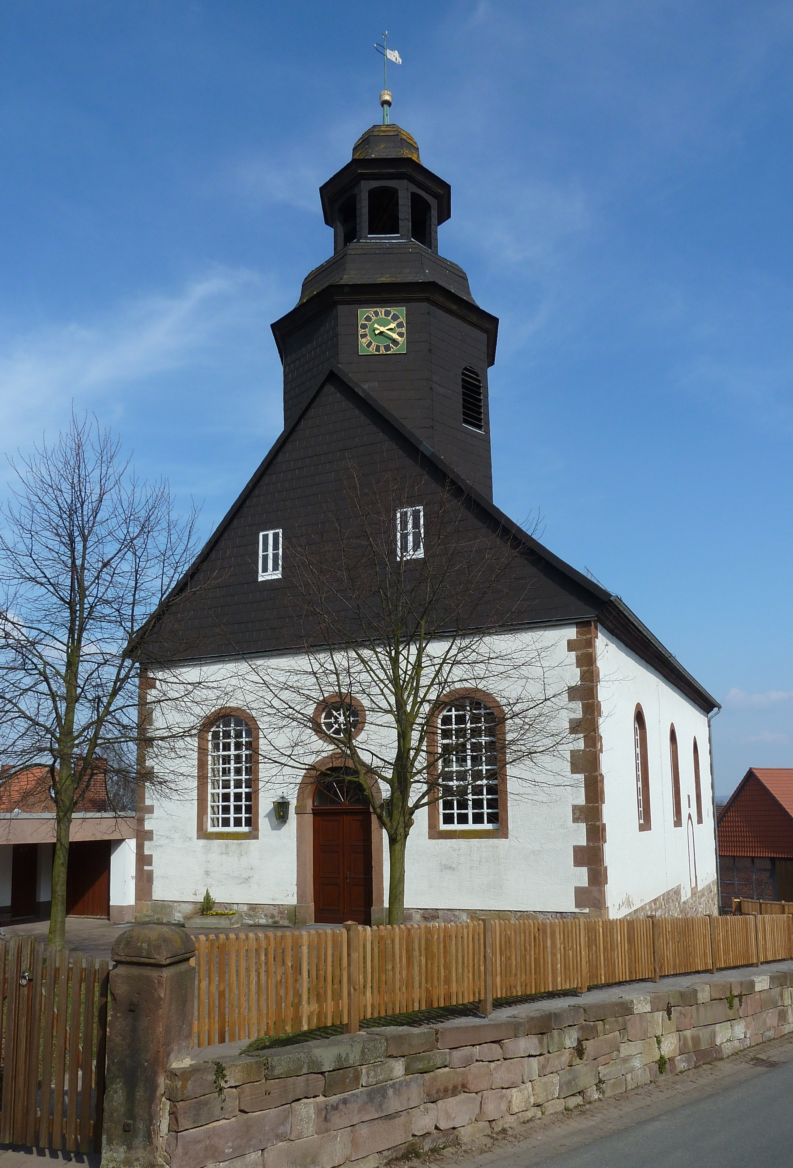 Ev.-luth. Kirche St. Johannis in Iber, Stadt Einbeck, Südniedersachsen.